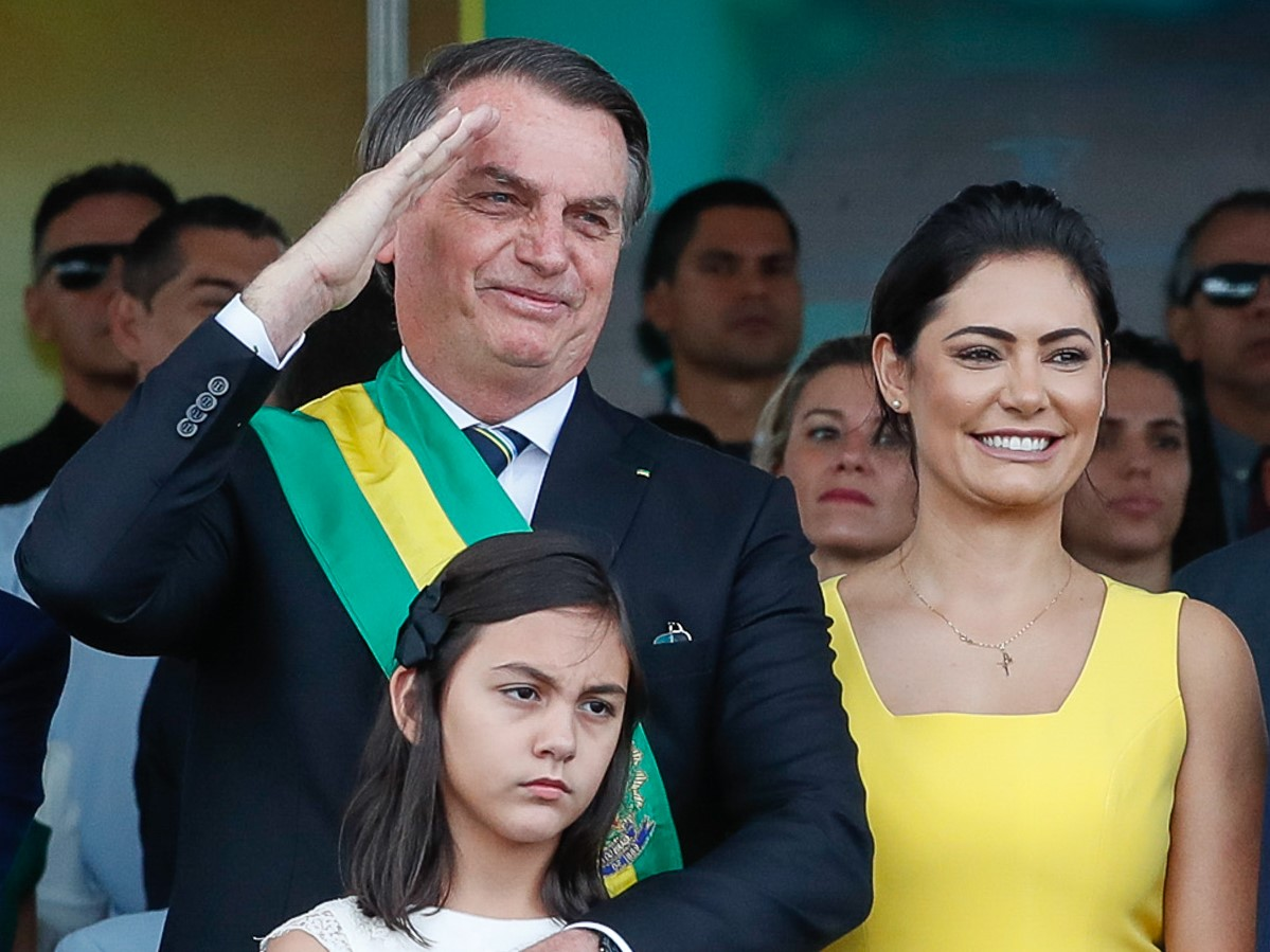 (Brasília - DF, 07/09/2019) Presidente da República, Jair Bolsonaro, durante desfile Cívico por ocasião do Dia da Pátria. Foto: Alan Santos/PR